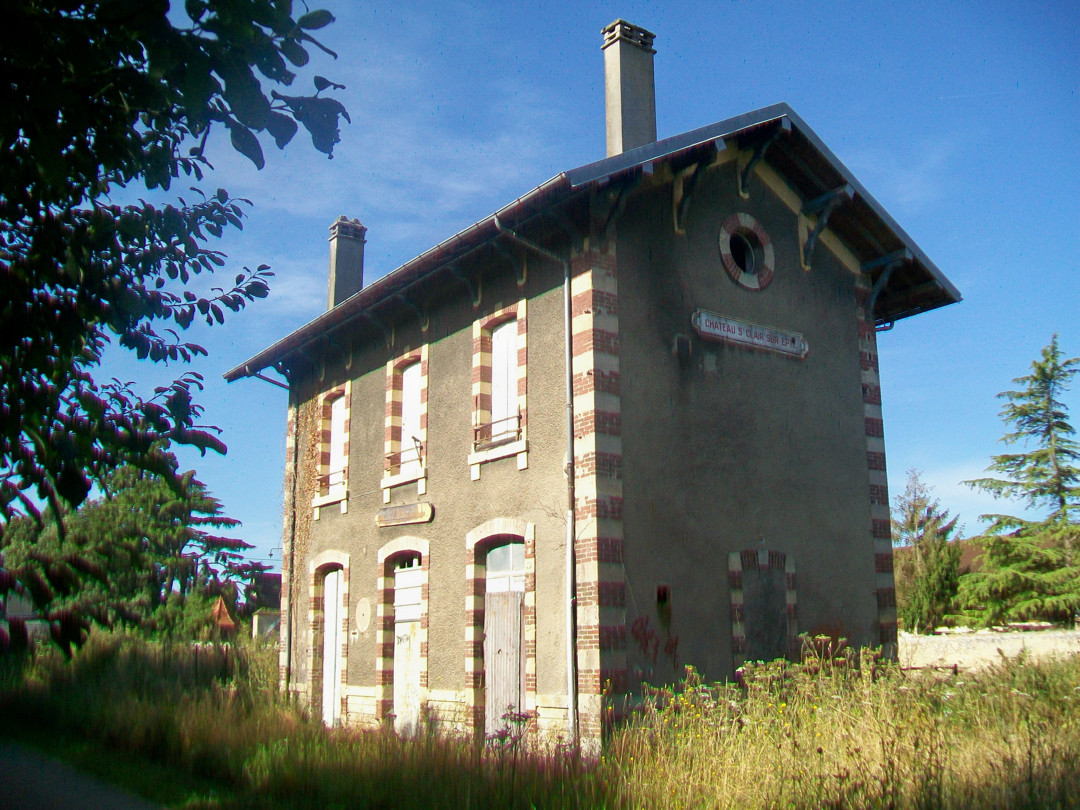 Le bâtiment-voyageurs depuis le nord-est.